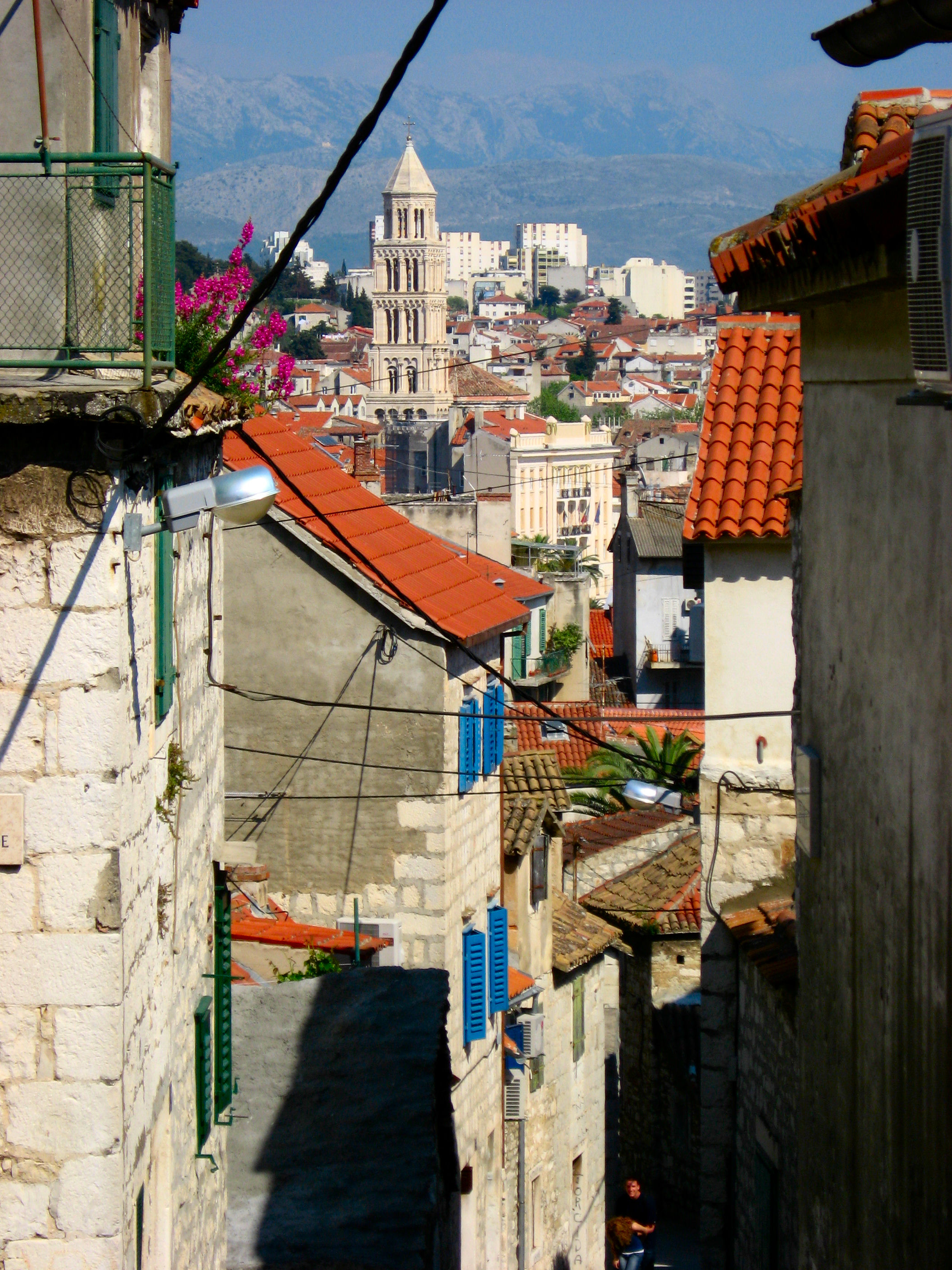 Pogled iz Varoša